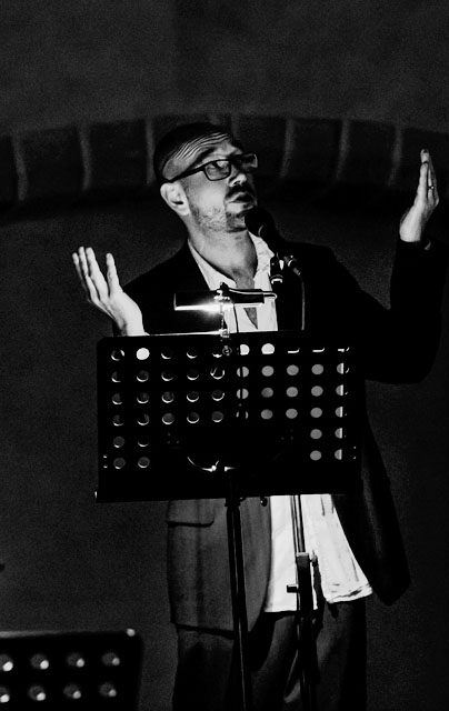 Asko Künnap esinemas Niguliste kirikus